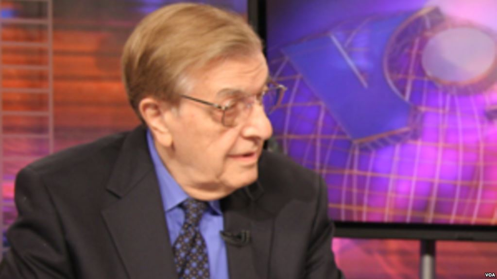 中文（台灣）: 美國在台協會前主席白樂崎參加美國之音電視訪談節目（資料照）